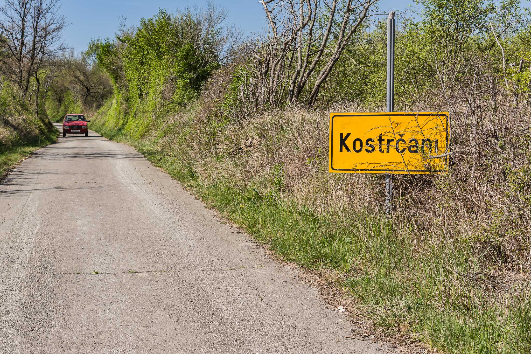 Kostrčani u Istri